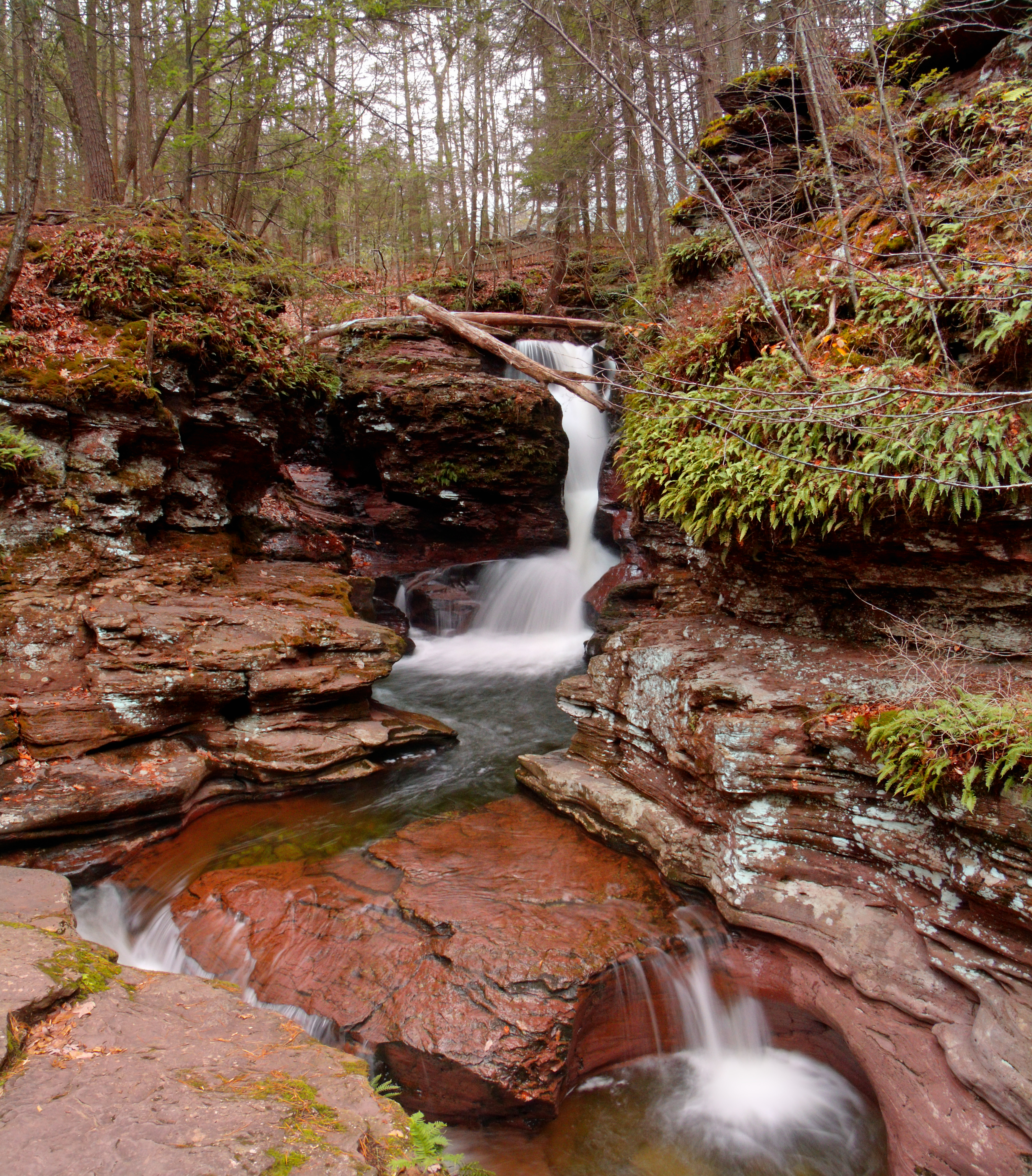 Adams Falls, Ricketts Glen State Park, Luzerne County.